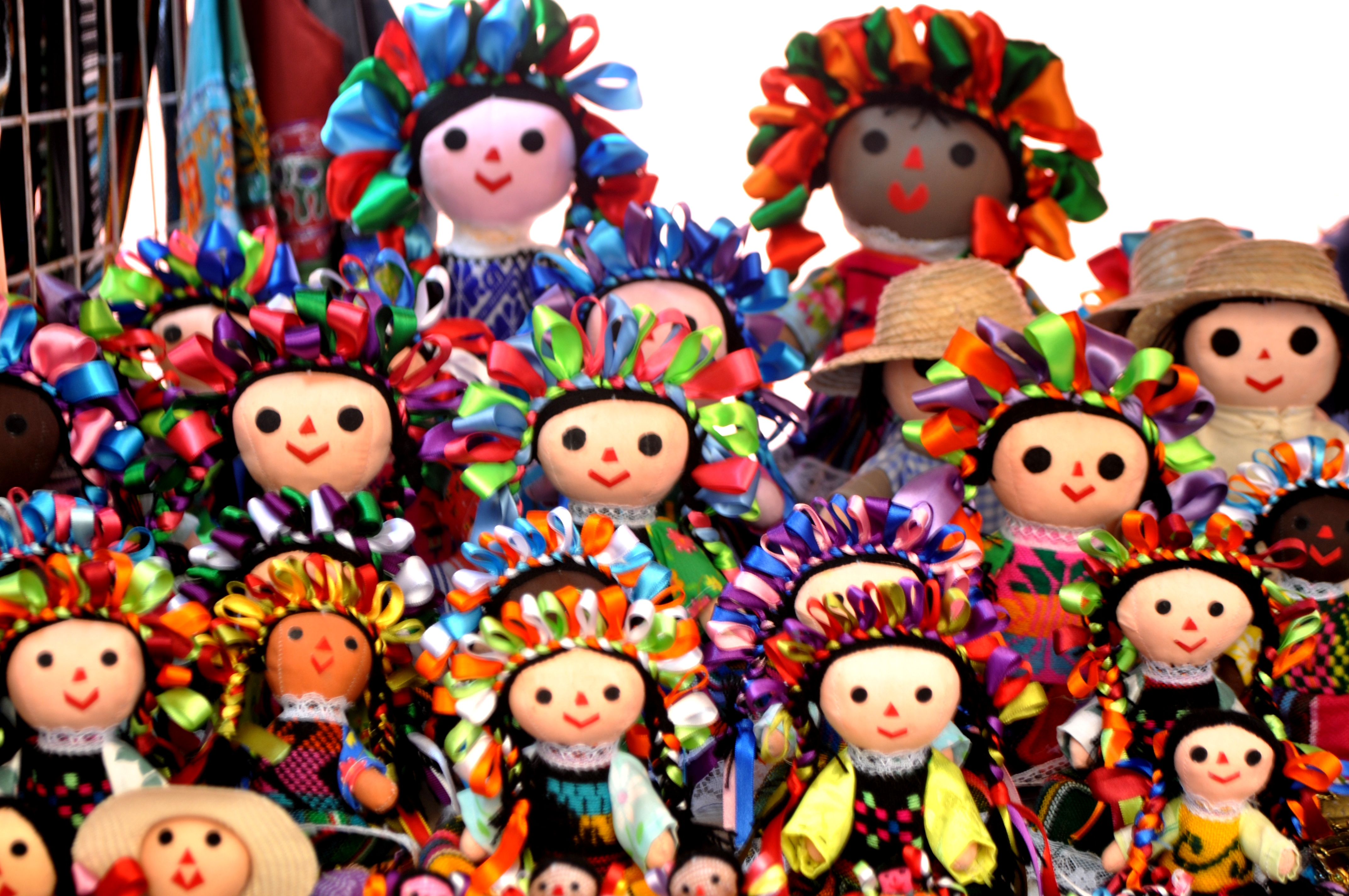 Paseando por los mercados.